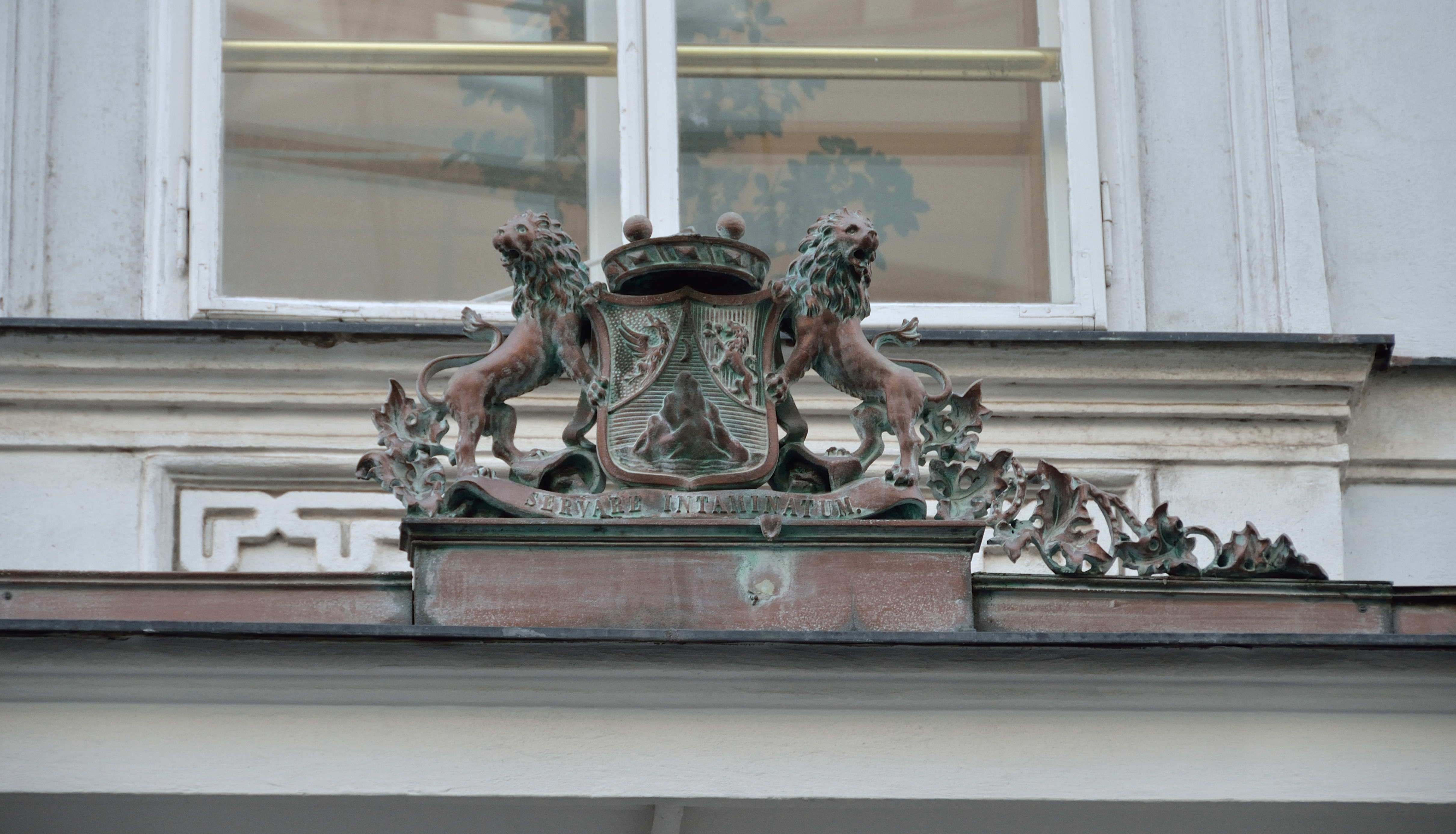 Über dem Portal zu Lugeck 7 befindet sich ein Wappen (etwas beschädigt) mit zwei Löwen und der Inschrift SERVARE INTAMINATUM (Unversehrt bewahren, der Wahlspruch der Familie Georg Simon von Sina).